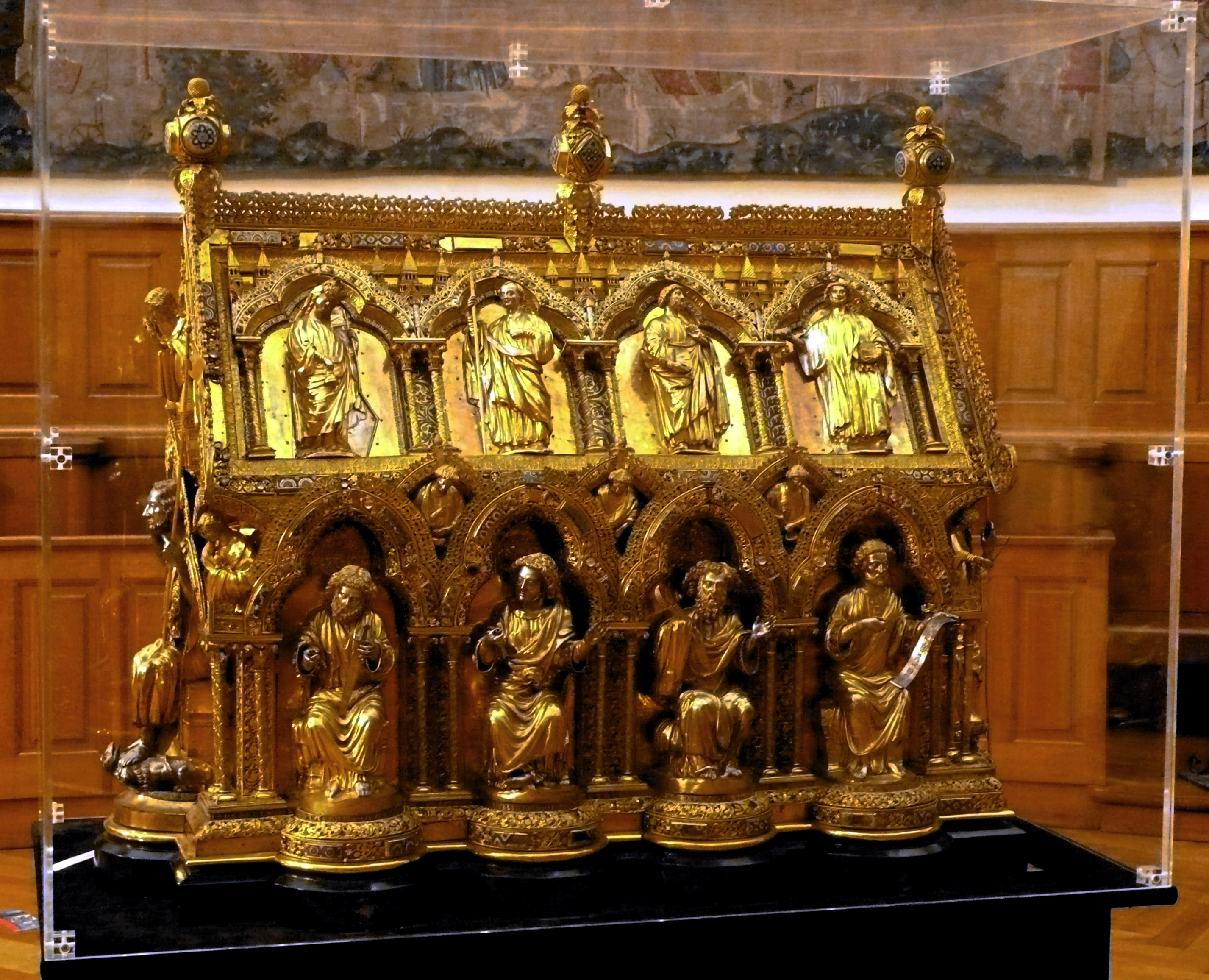 Tournai (Belgique), Cathédrale Notre-Dame, Châsse de Saint-Éleuthère